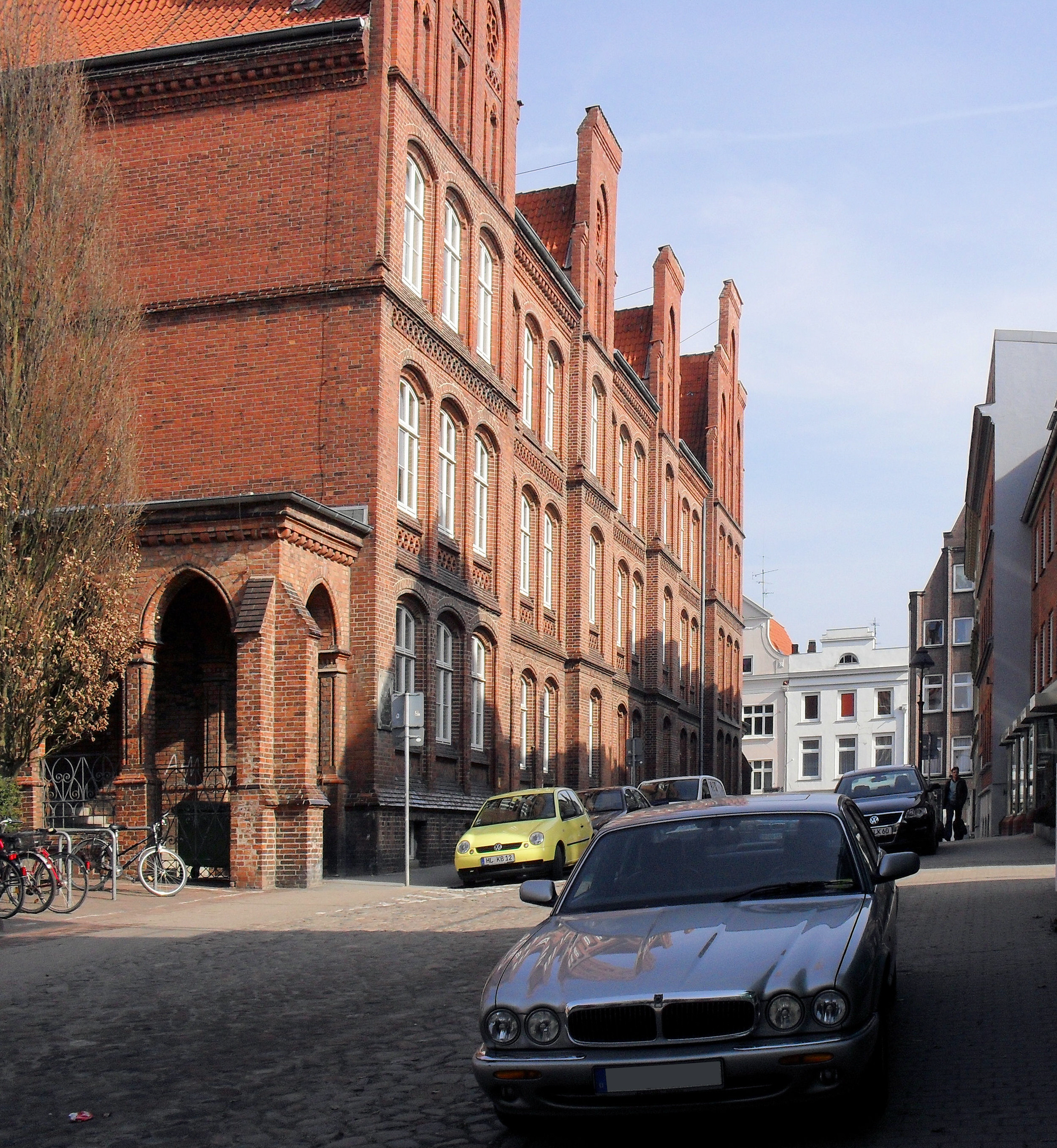 Hinter der Burg in Lübeck